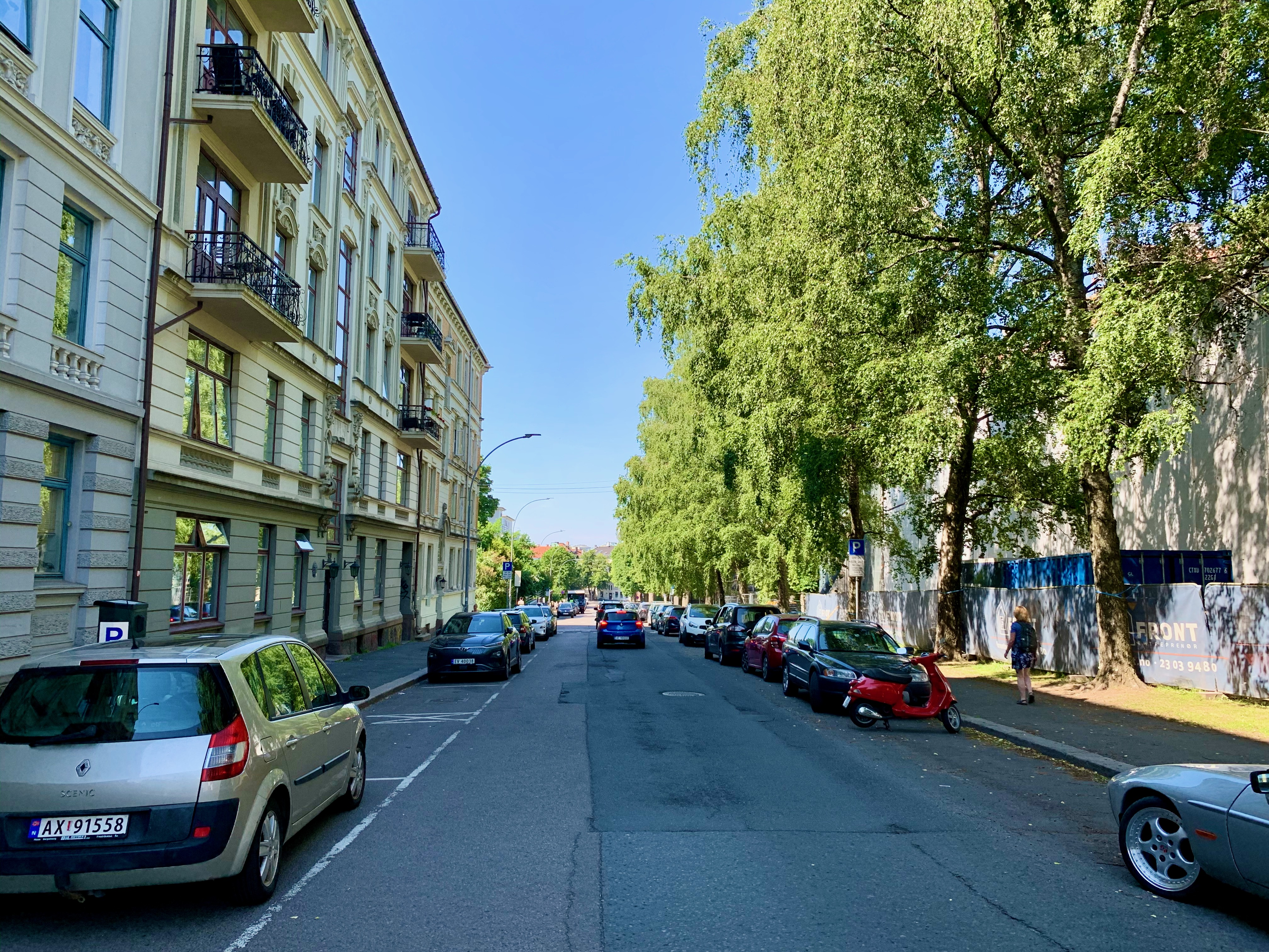 General Birchs gate i Oslo.